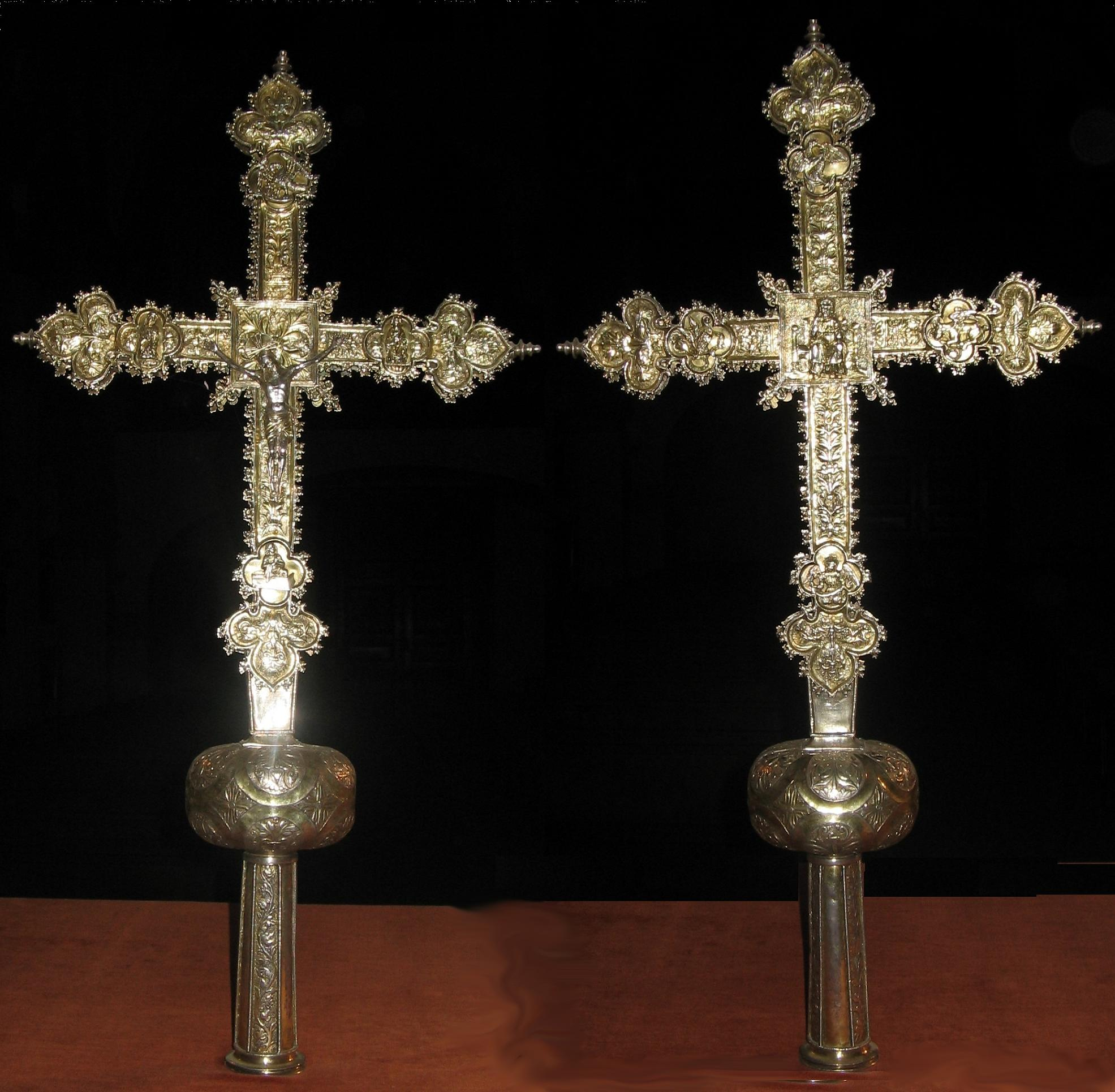 Cruz procesional grande Plata dorada, sin punzón (anverso y reverso).